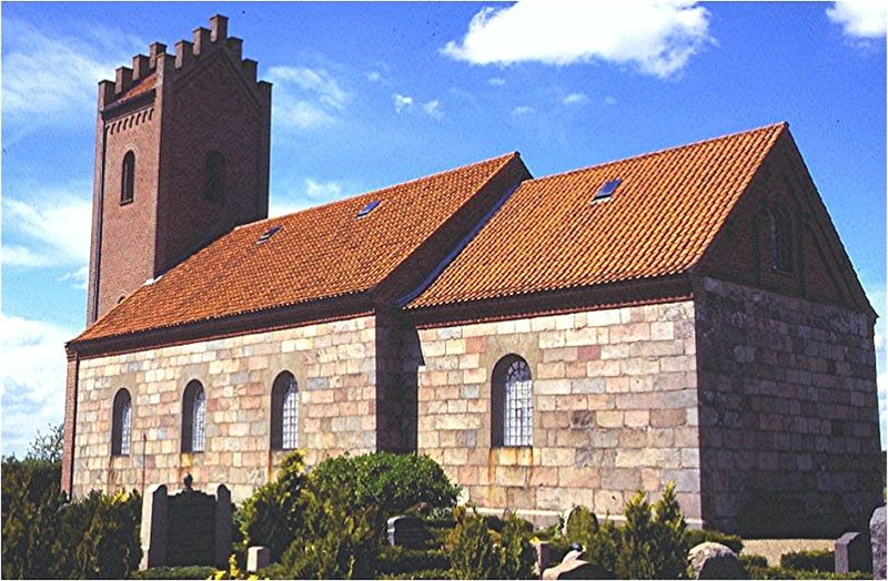 Sporup Kirke set fra sydøst Sporup Kirke ligger i Sporup Sogn, Favrskov Provsti (Århus Stift). Sognet ligger i Favrskov Kommune; indtil Kommunalreformen i 1970 lå det i Gjern Herred (Skanderborg Amt). Apsis, kor og skib er opført i romansk tid af granitkvadre